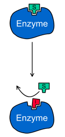 Schéma d'un inhibiteur compétitif